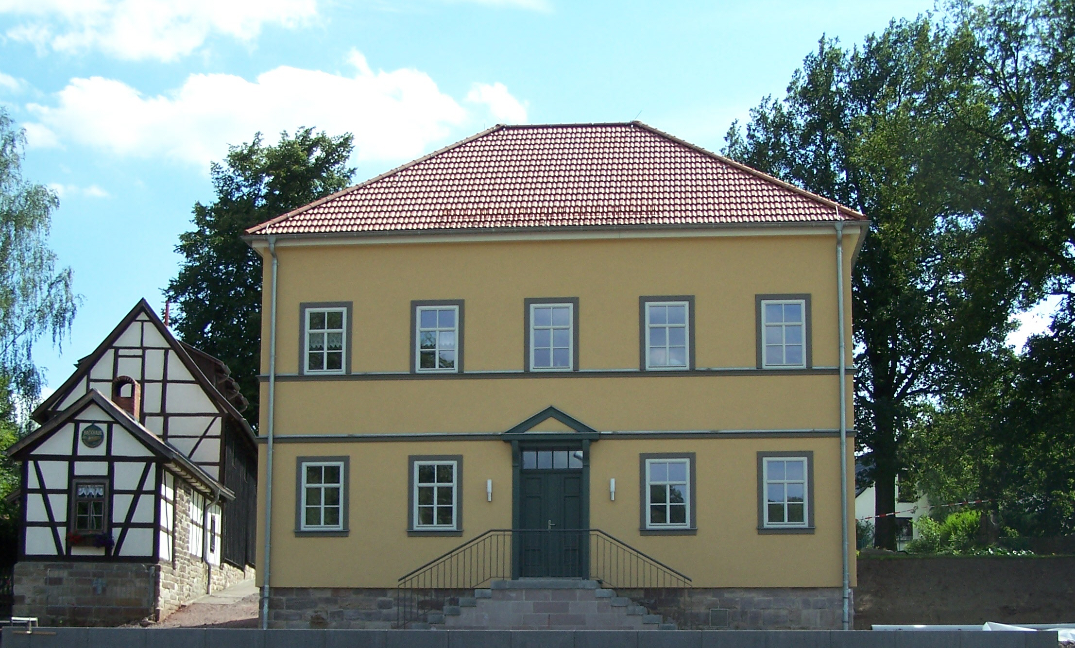 Die ehemalige Dorfschule in Schönau an der Hörsel nach der Sanierung.